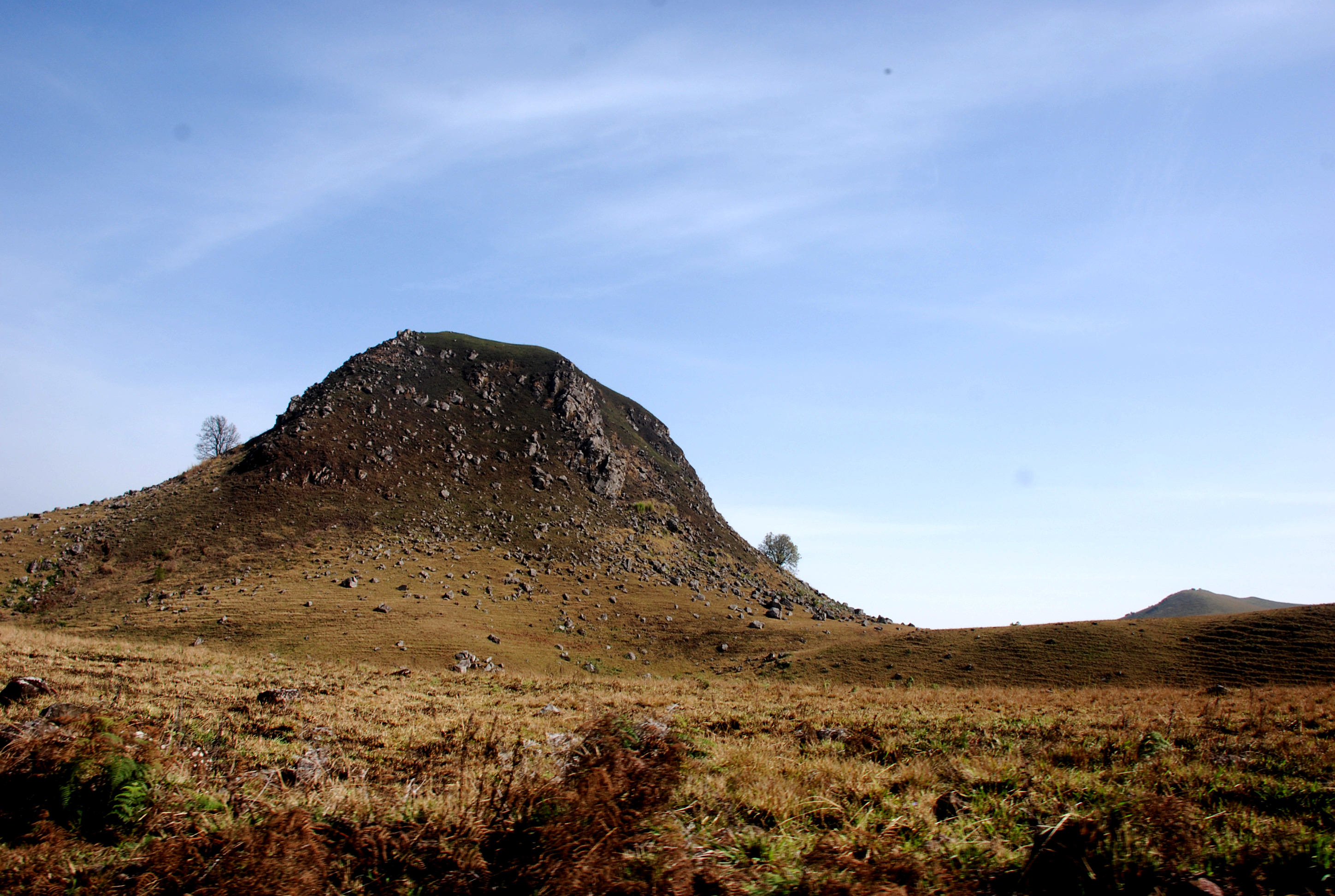 Le mont manengoumba